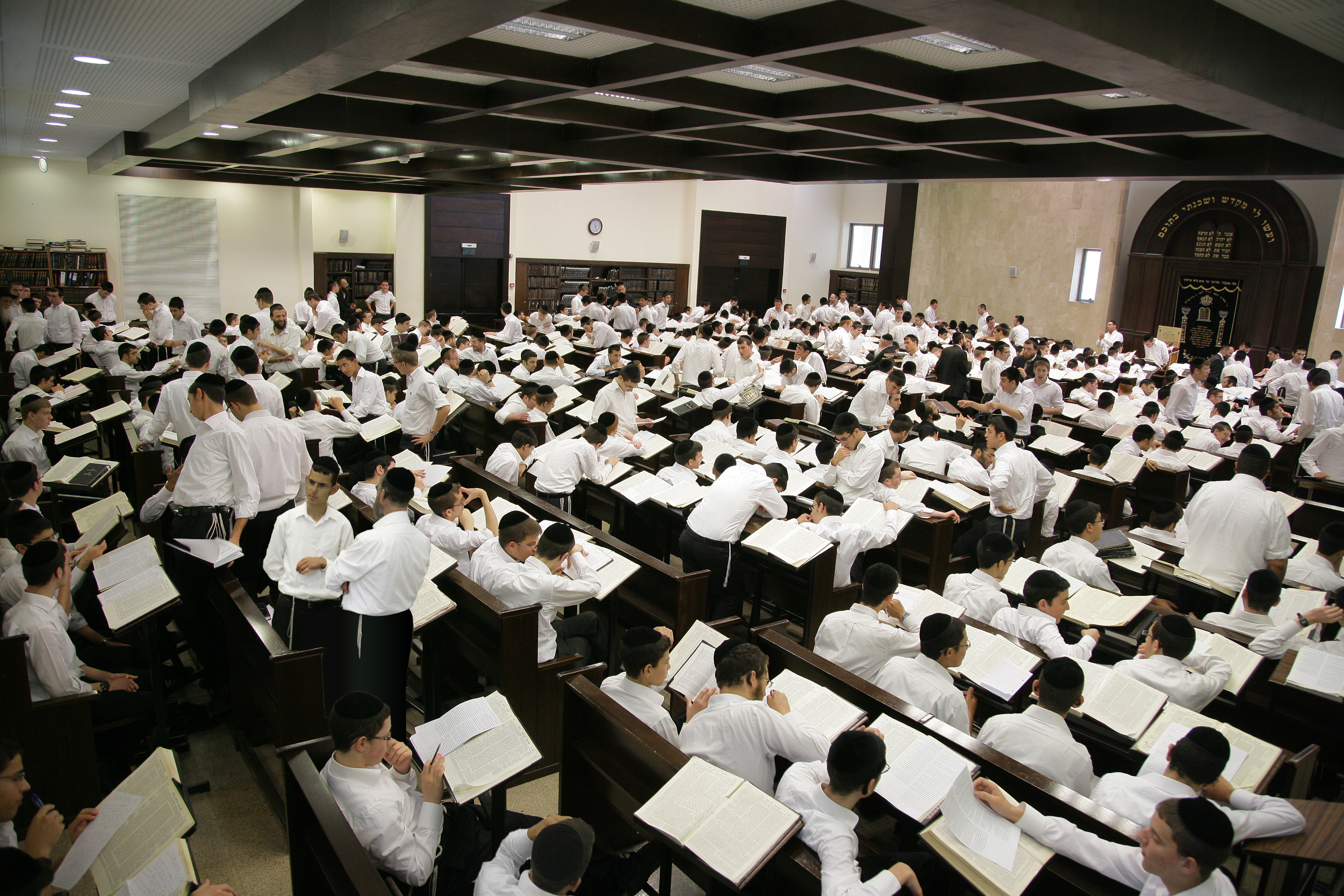 ישיבת מאור התלמוד